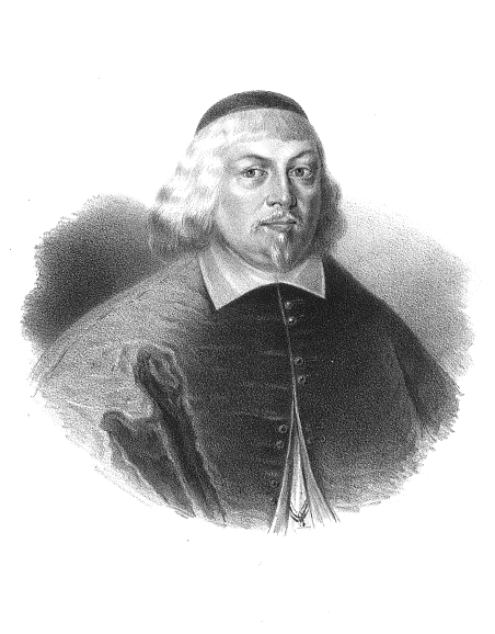 Wacław Leszczyński primate of Poland